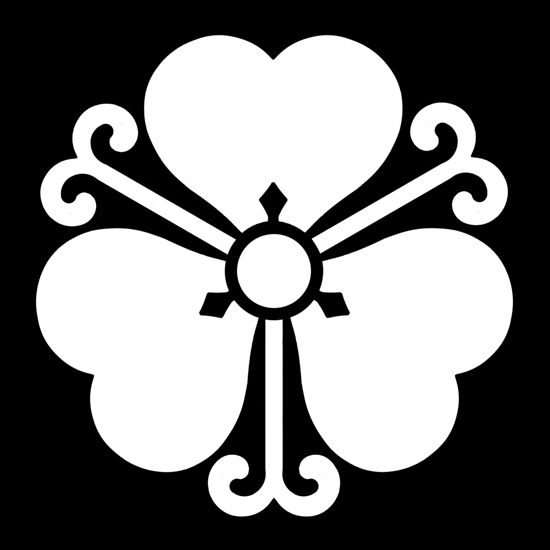 「蔓片喰」紋（染抜）